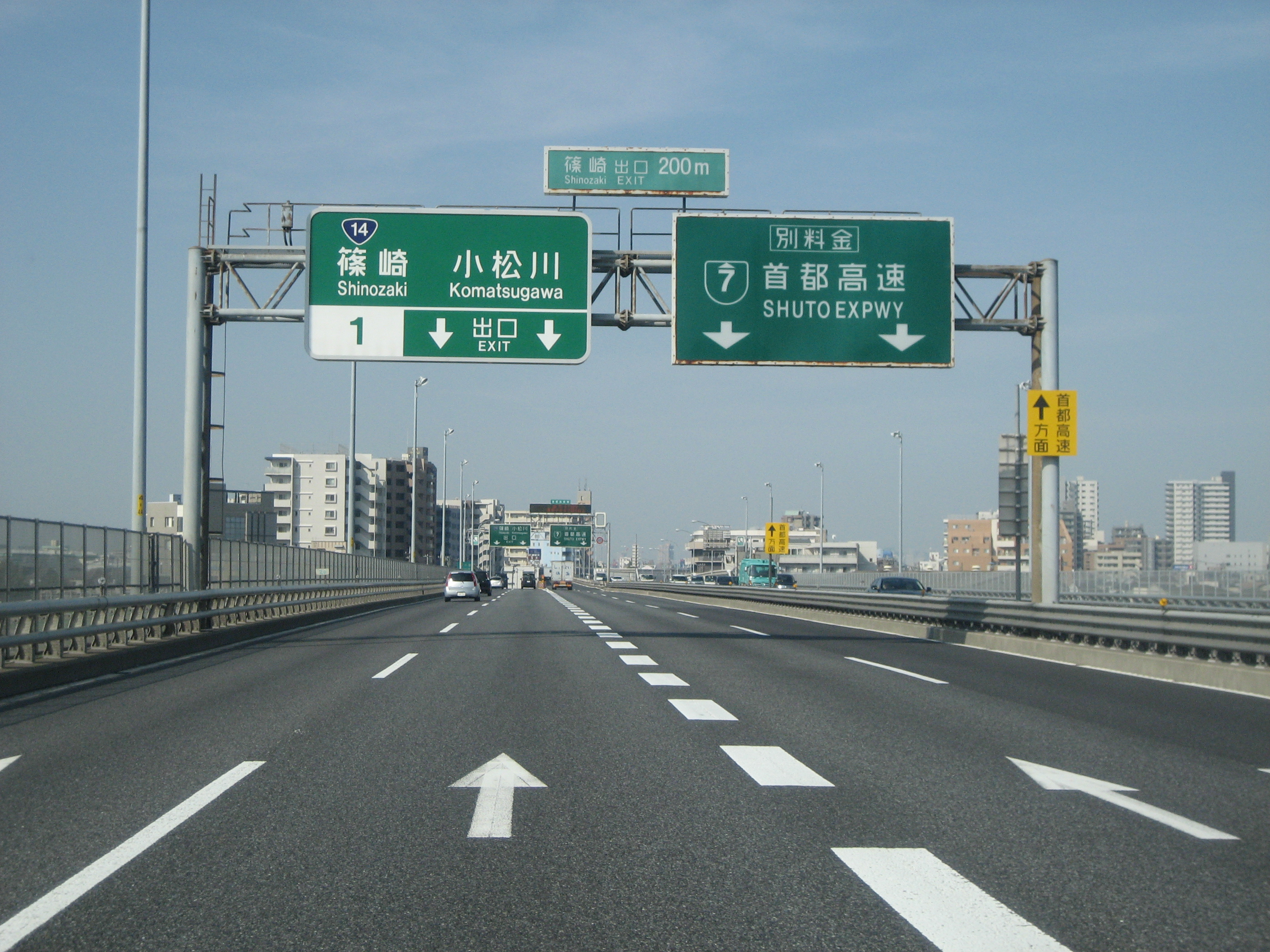 京葉道路篠崎インターチェンジ出口付近（分流200ｍ手前付近）